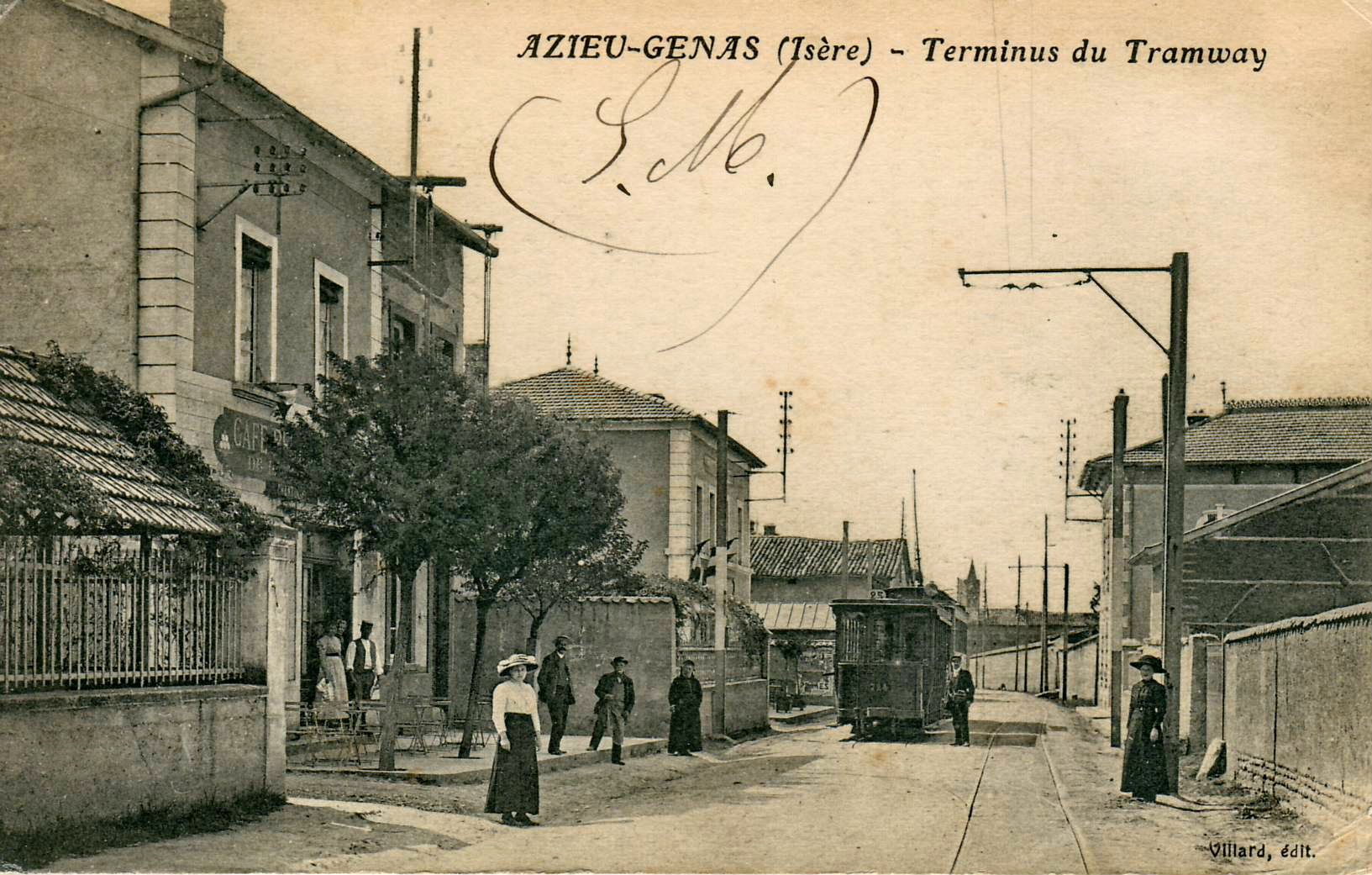 Carte postale ancienne éditée par Villard AZIEU-GENAS - Terminus du Tramway Motrice 724, circulant sur la ligne 25 de l'OTL